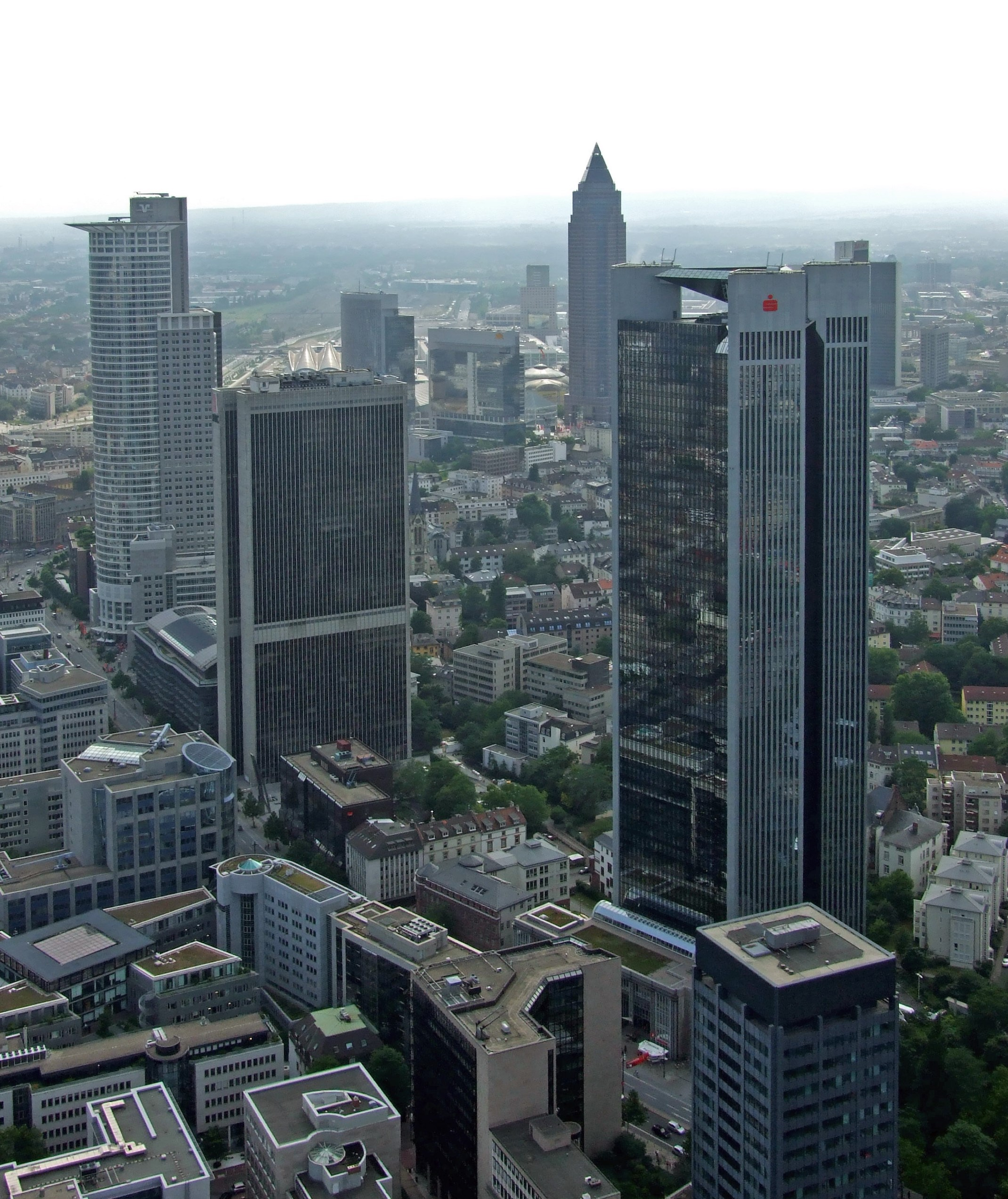 Hochhaeuser in Blickrichtung Torhaus Messe, Ffm